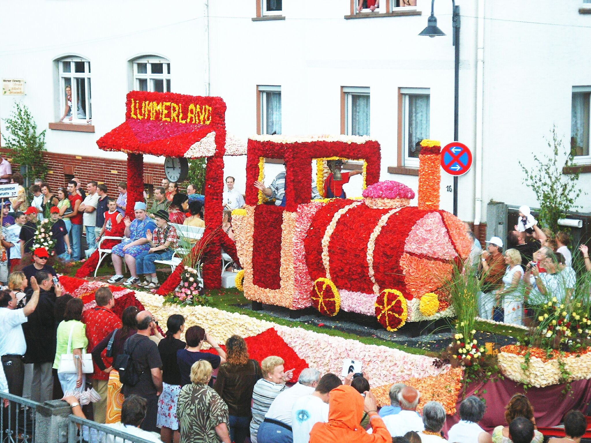 Steinfurther Rosenfest - Motivwagen mit ca. sechzigtausend Rosenblüten